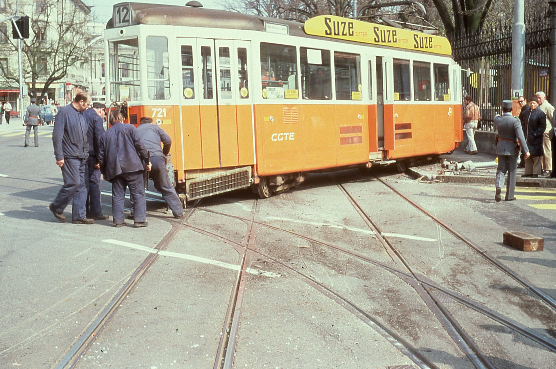 Photo. Trams aux Fils. Déraillement à la rue du Conseil-Général samedi 8 avril 1978 à 1000h. entre les compositions motrice 721 et remorque 301 et motrice 718 et remorque 304.